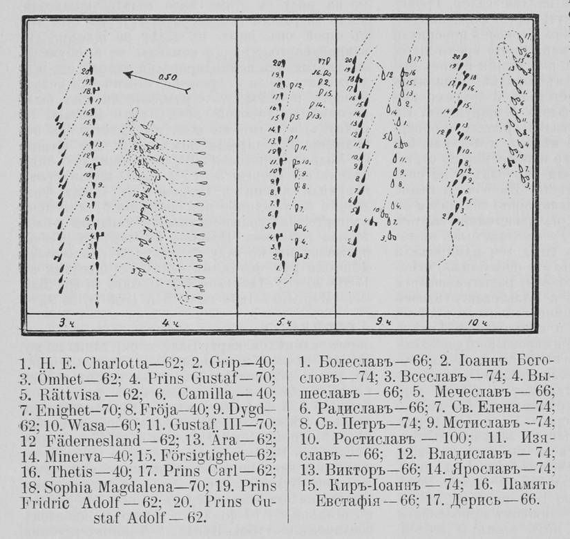 Это изо было использовано в статье «Гогландское сражение» опубликованной в восьмом томе «Военной энциклопедии», который был издан книгоиздательским товариществом И. Д. Сытина в 1912 году в столице Российской империи городе Санкт-Петербурге.